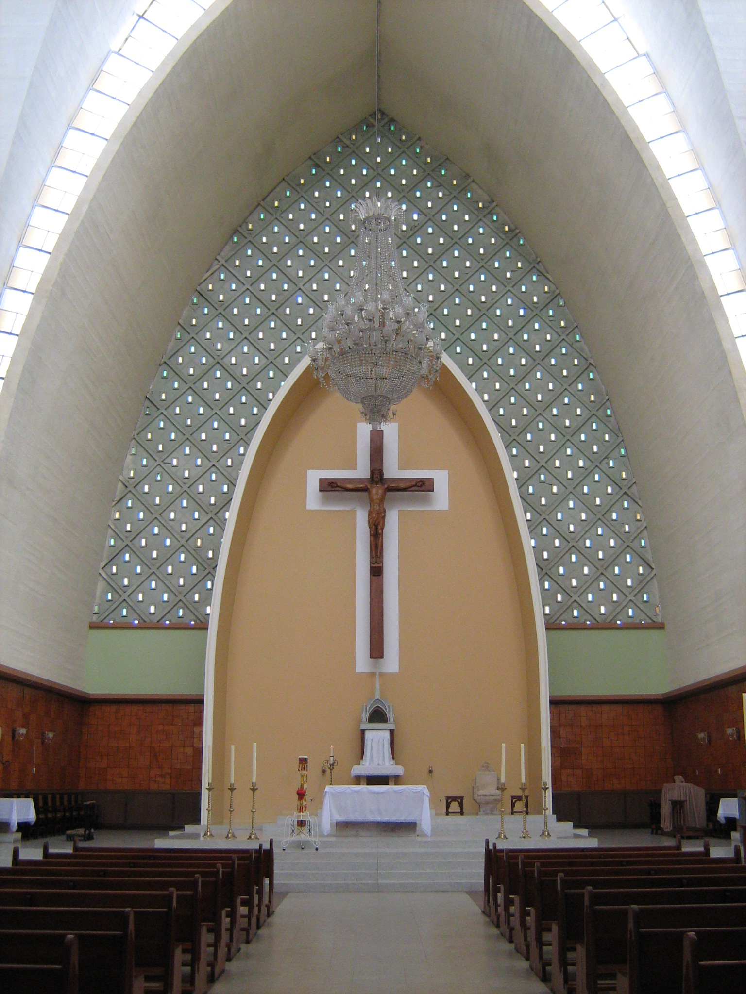 Basílica Menor de Nuestra Señora de las Misericordias en el Municipio de Santa Rosa de Osos, Antioquia. Colombia.